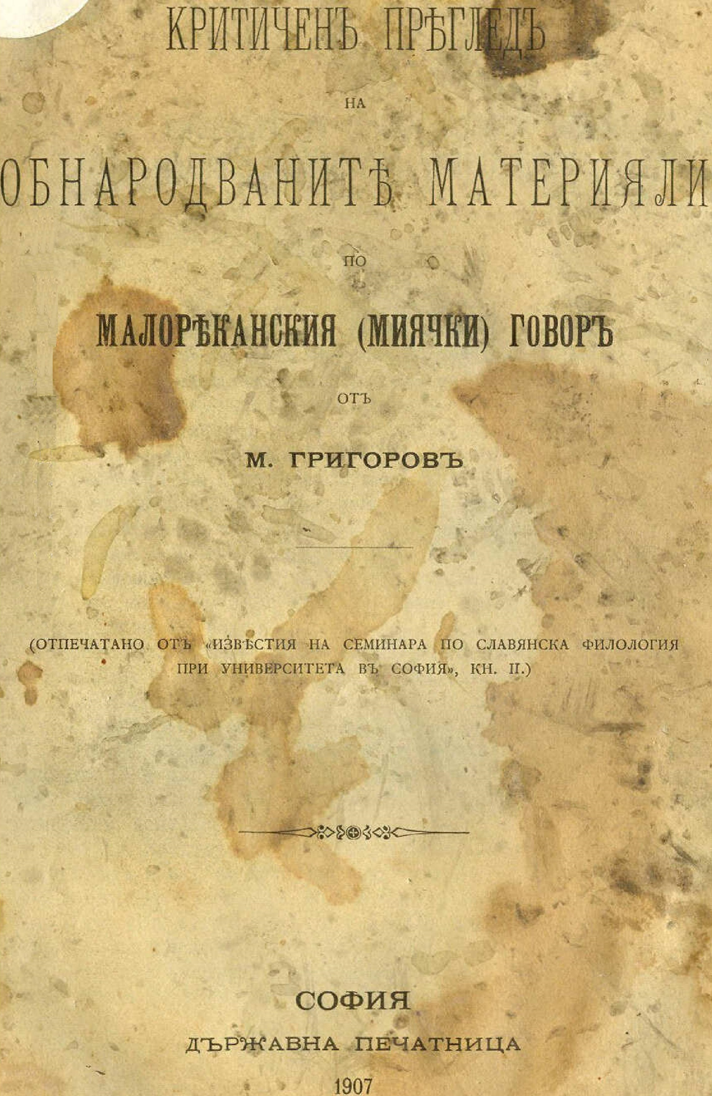 Григоровъ, Марко. Критиченъ прѣгледъ на обнародванитѣ материали по малорѣканския (миячки) говоръ. // Извѣстия на семинара по славянска филология при университета въ София II. София, Държавна печатница, 1907. с. 444 - 470.